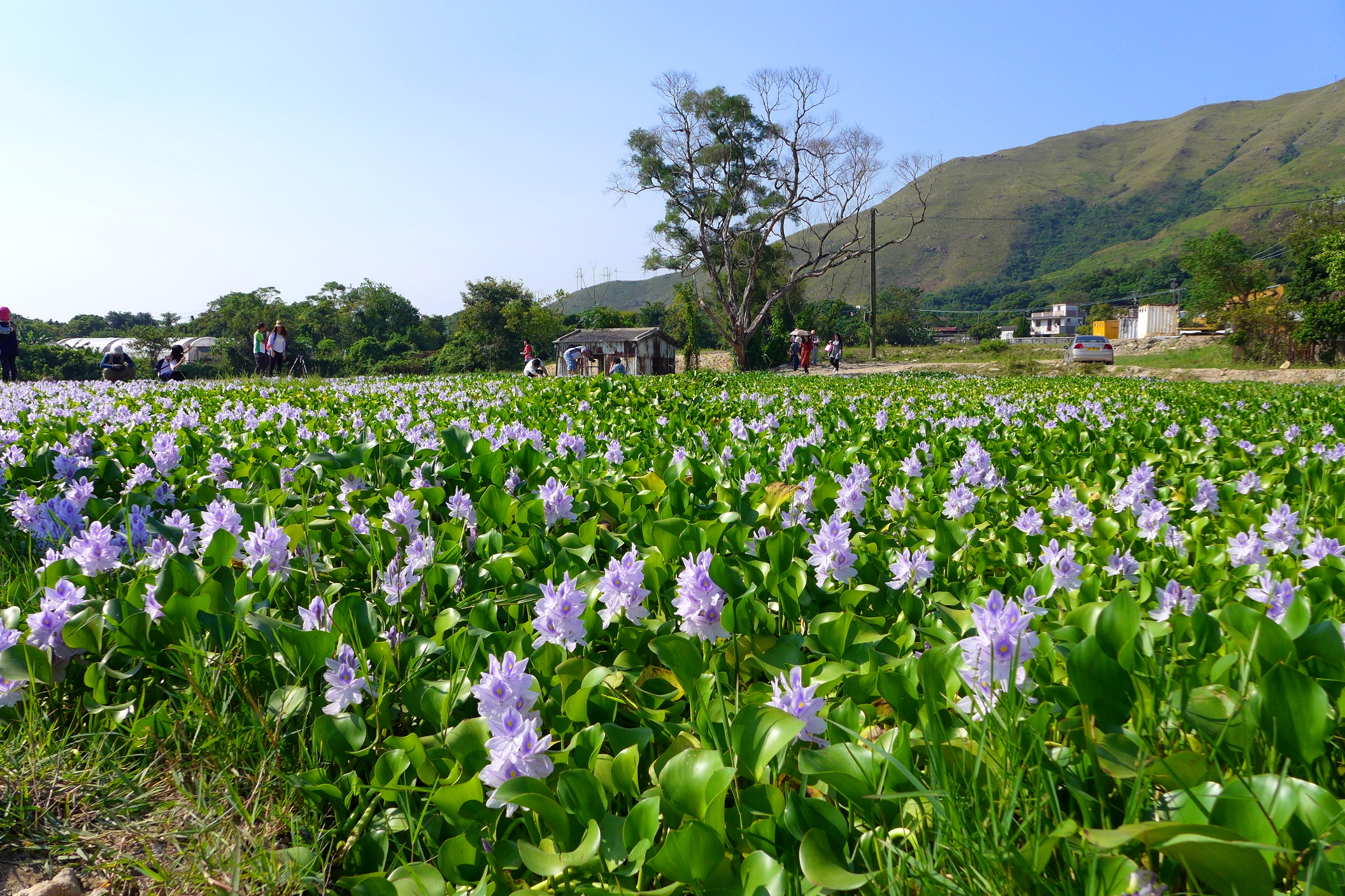 Fung Kat Heung Water Hyacinth